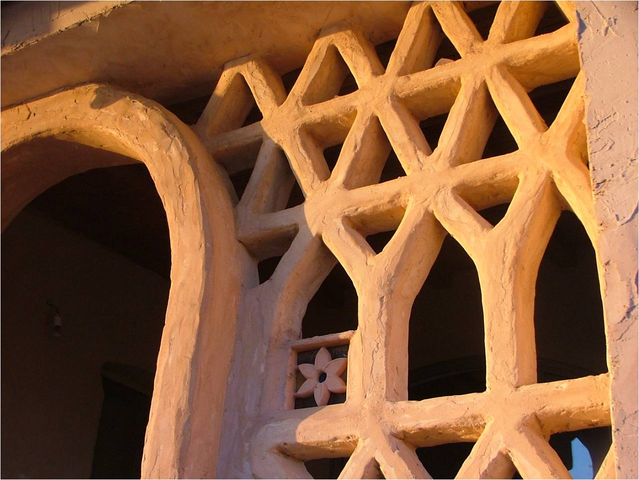 משרביות בעין יעקב